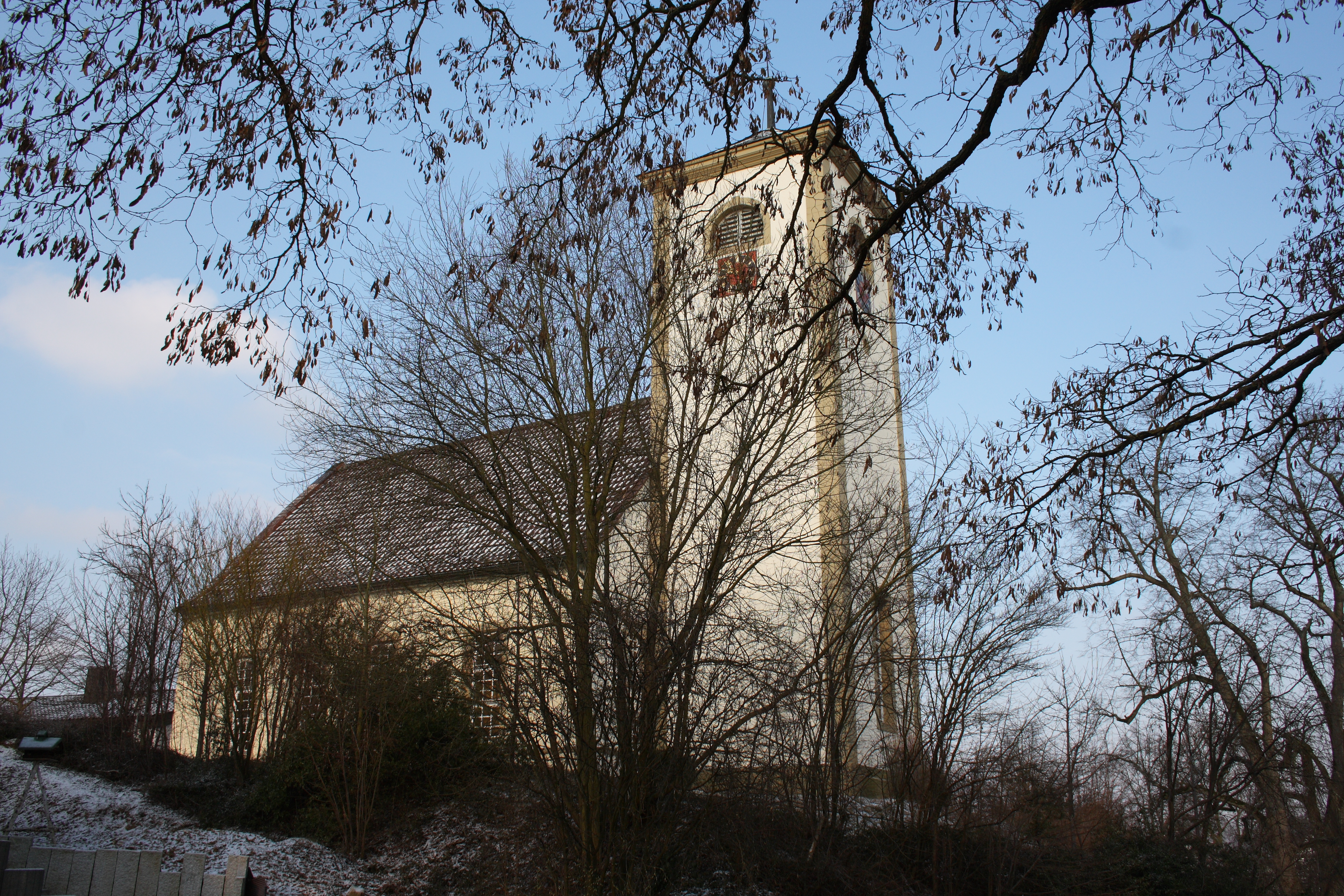 Evangelisches Kirche in Stebbach